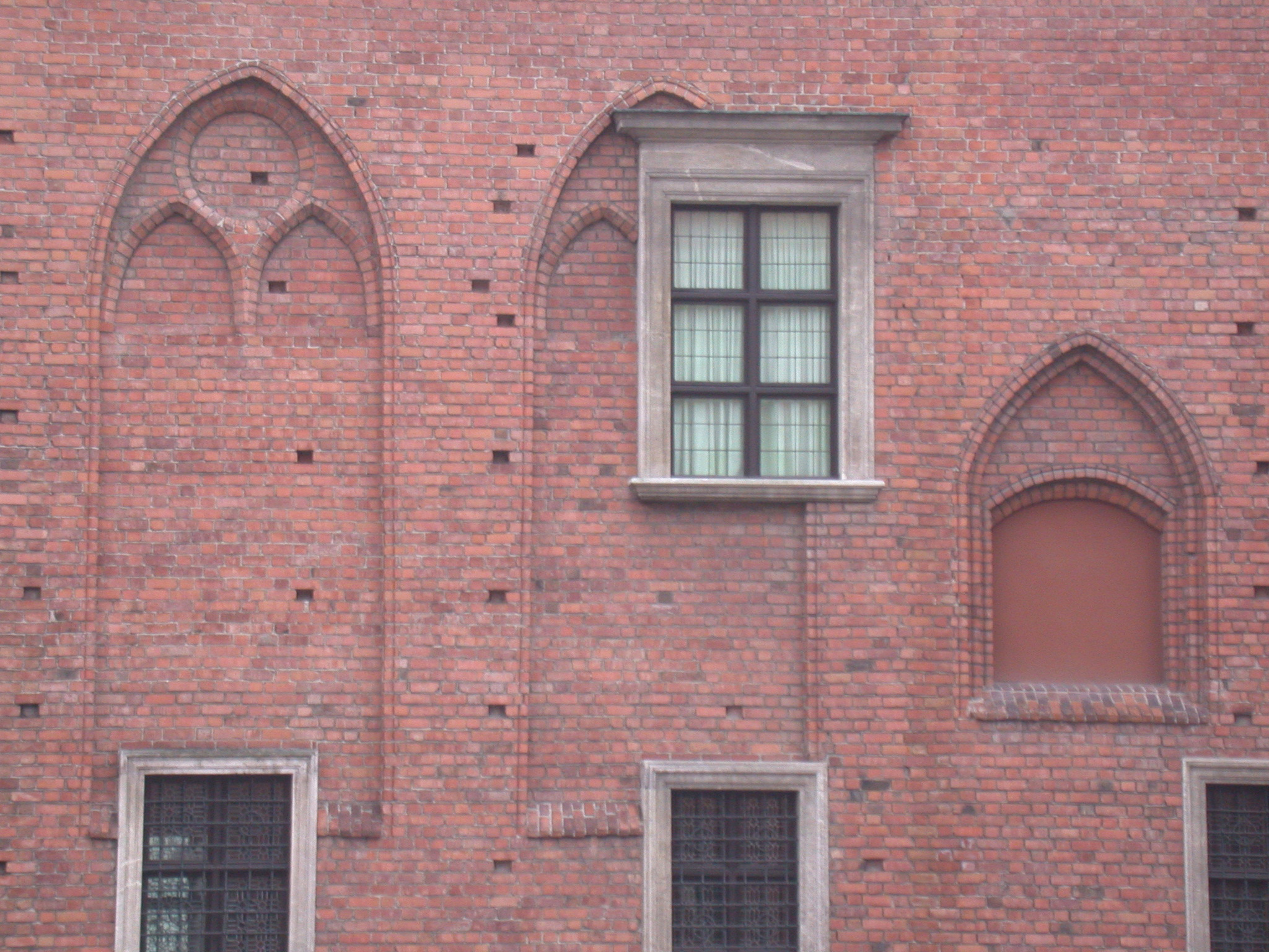 Varsavia, Castello Reale (Zamek Królewski), Cortile interno, Ala gotica (XV secolo).